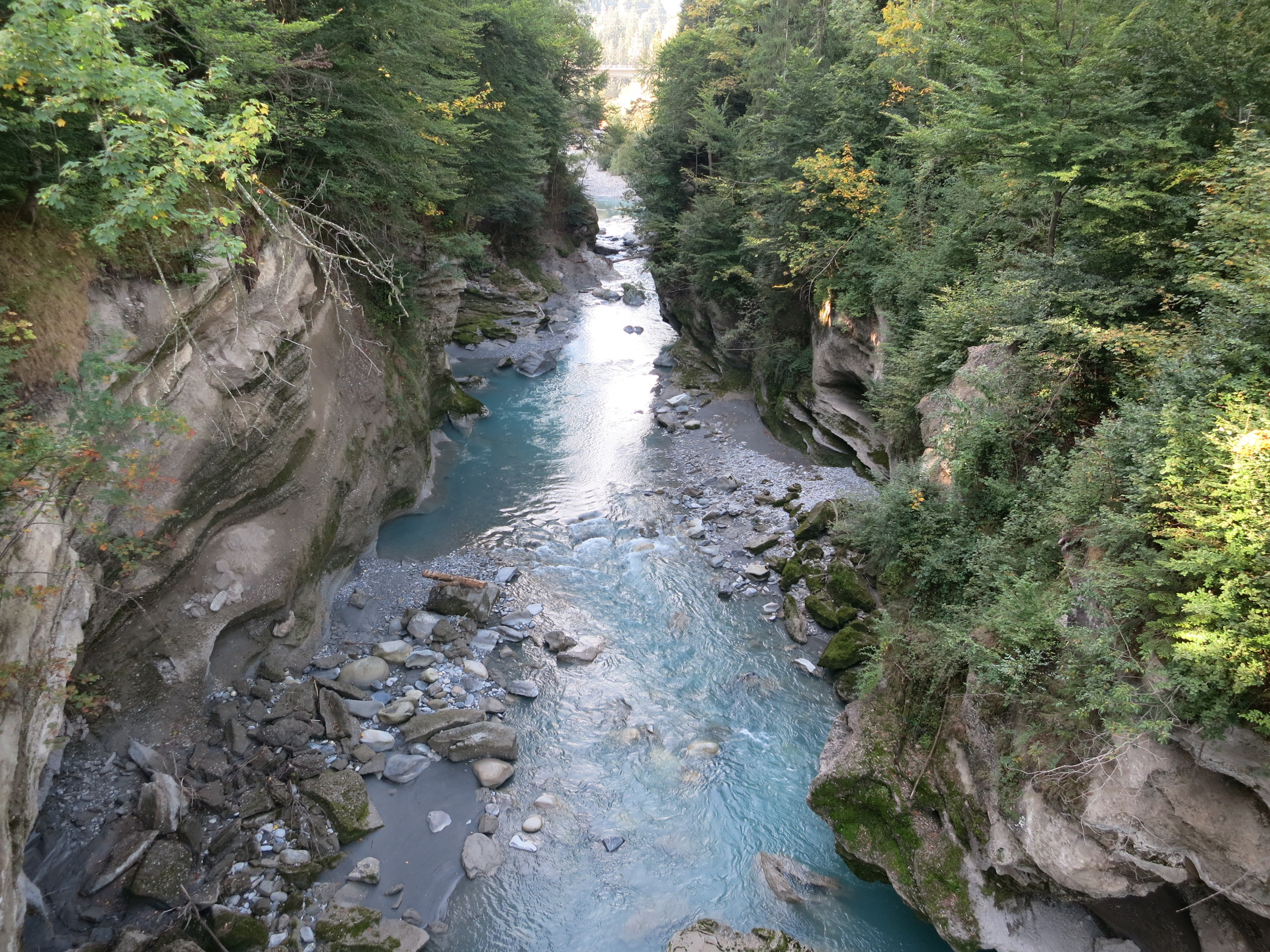 Sperrstelle Einigen, Spiez BE, Schweiz